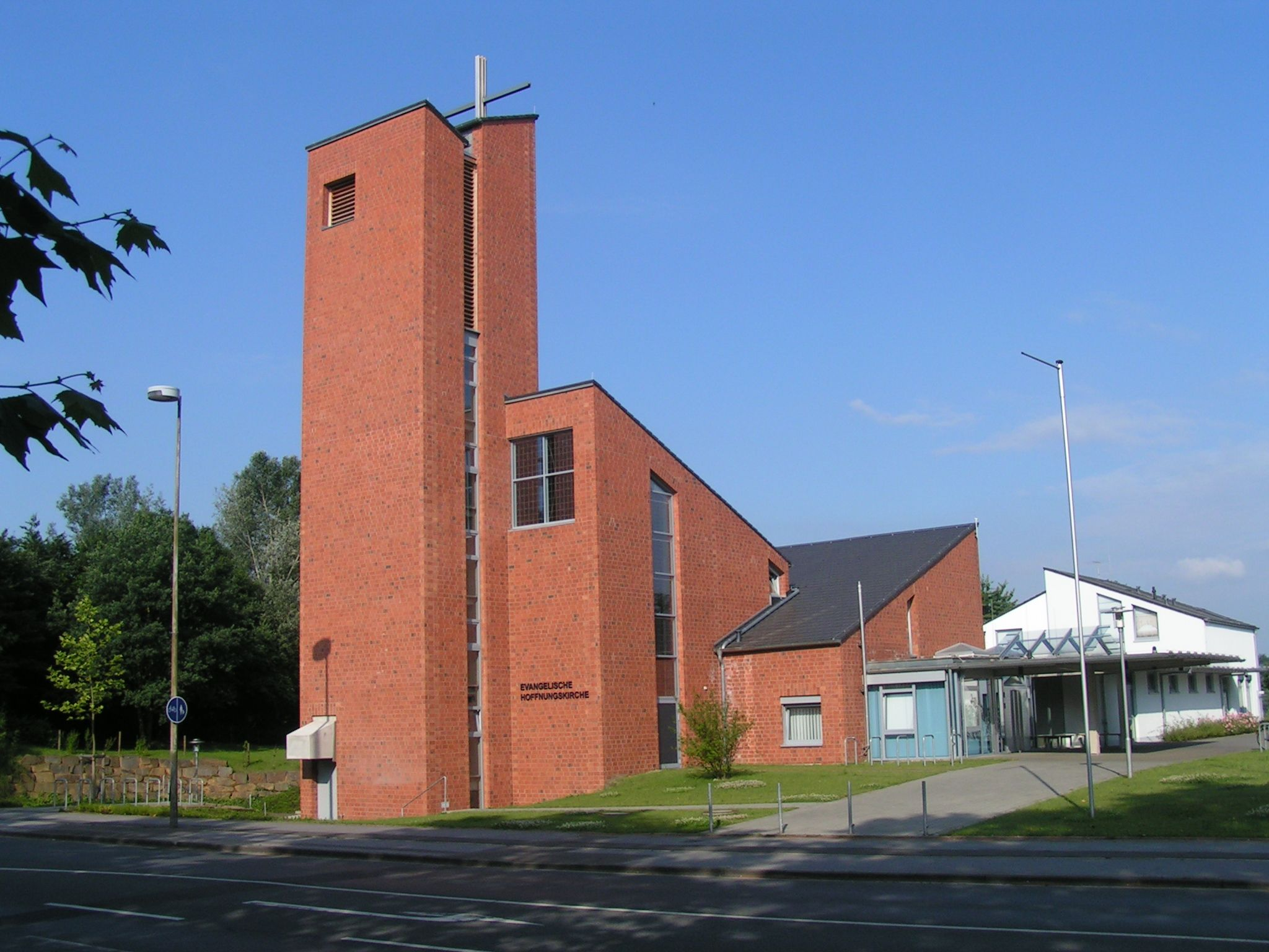 evangelische Hoffnungskirche, Leverkusen-Rheindorf. Eröffnet 2006.